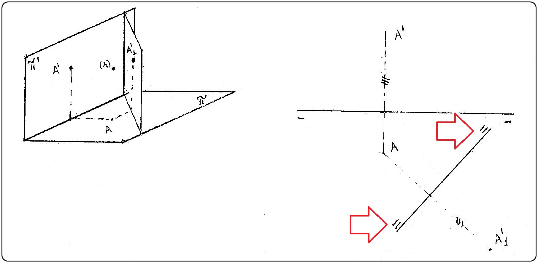 Exercício de Geometria Descritiva, Mudança de plano vertical de ponto.